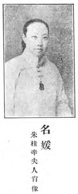 治家全書圖像